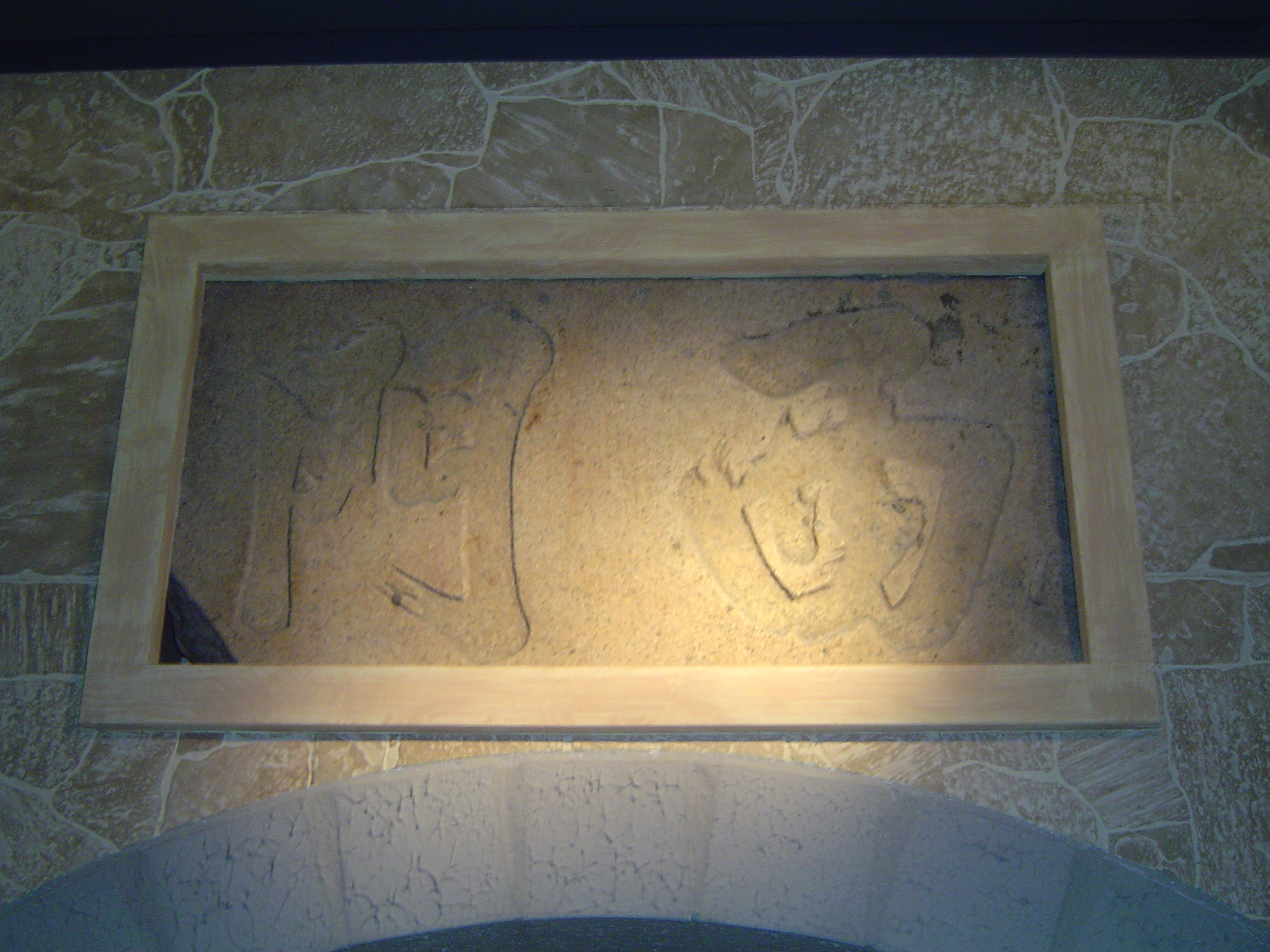 高雄市左營區鳳山縣舊城西門門額。